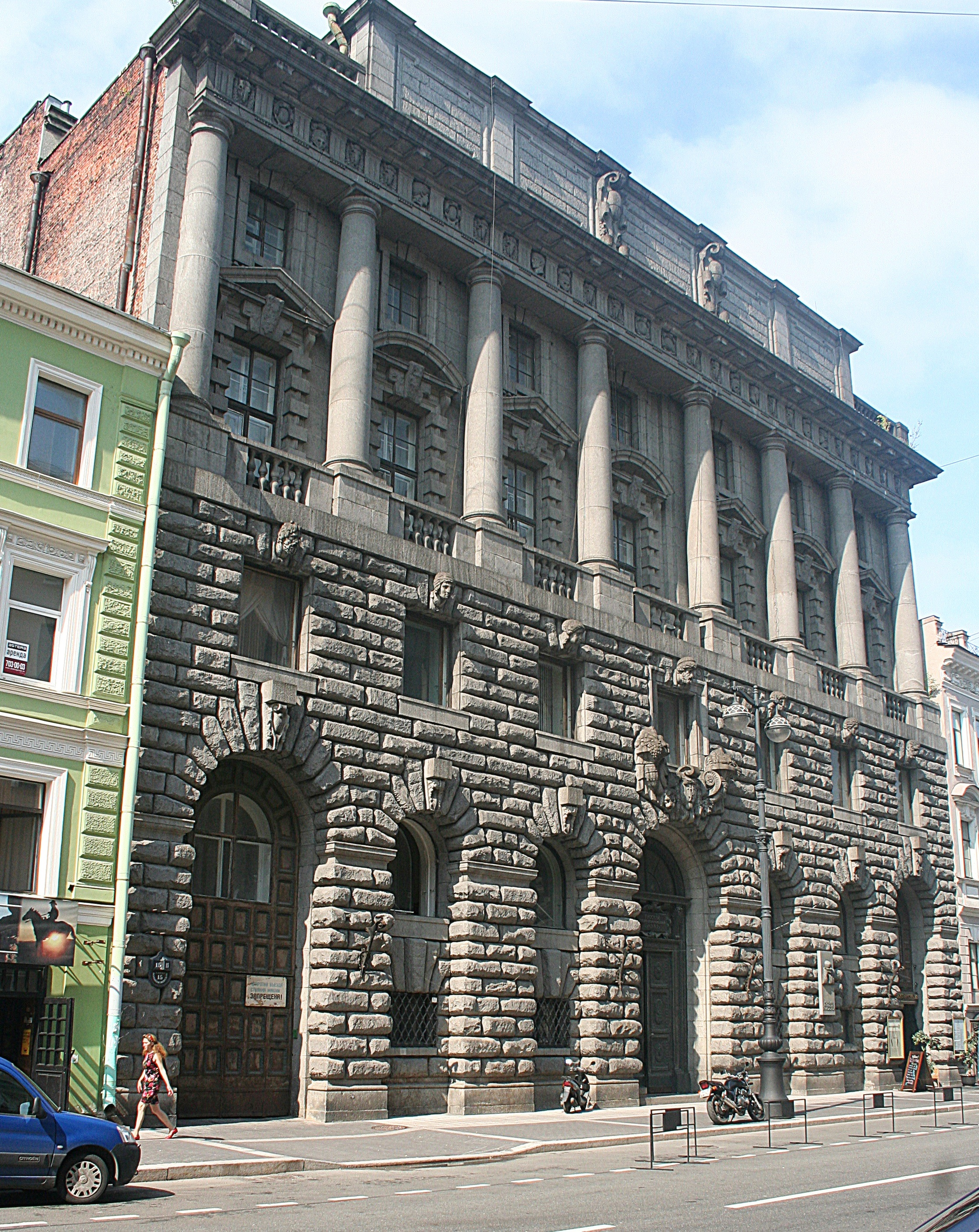 Здание Русского торгово-промышленного банка (Санкт-Петербург и Лен.область, Санкт-Петербург, б. Морская улица, 15)